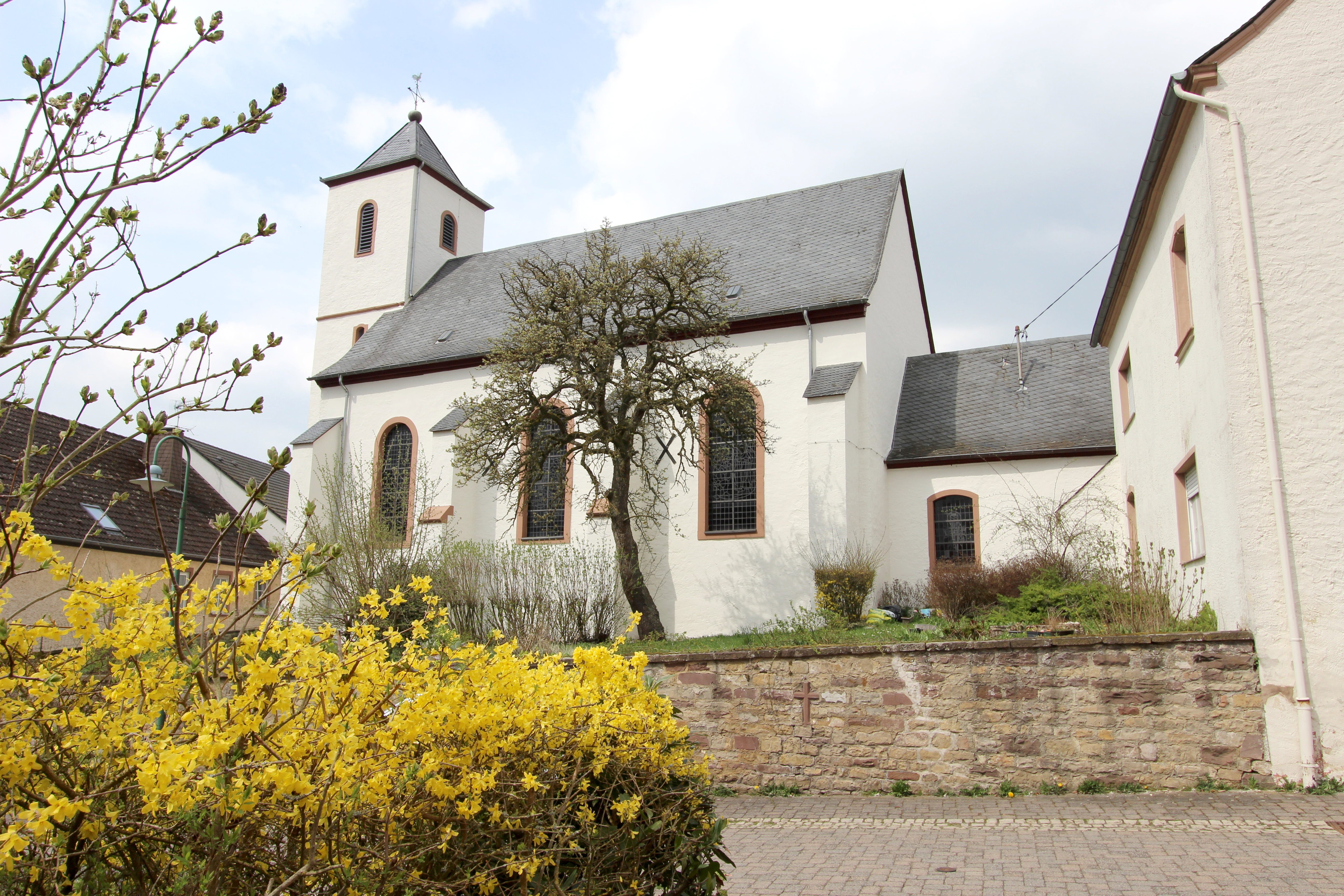 54634 Metterich, Kirchstraße 1a. Saalbau, 1727, Westturm 1754, spätgotischer Chor; mit Ausstattung; südlich auf Brunnenstock, bezeichnet 1848, barocker Sockelstein mit Nepomuk-Skulptur, 18. Jahrhundert; Friedhofskreuz, Mitte des 19. Jahrhunderts. Aufnahme von 2018.